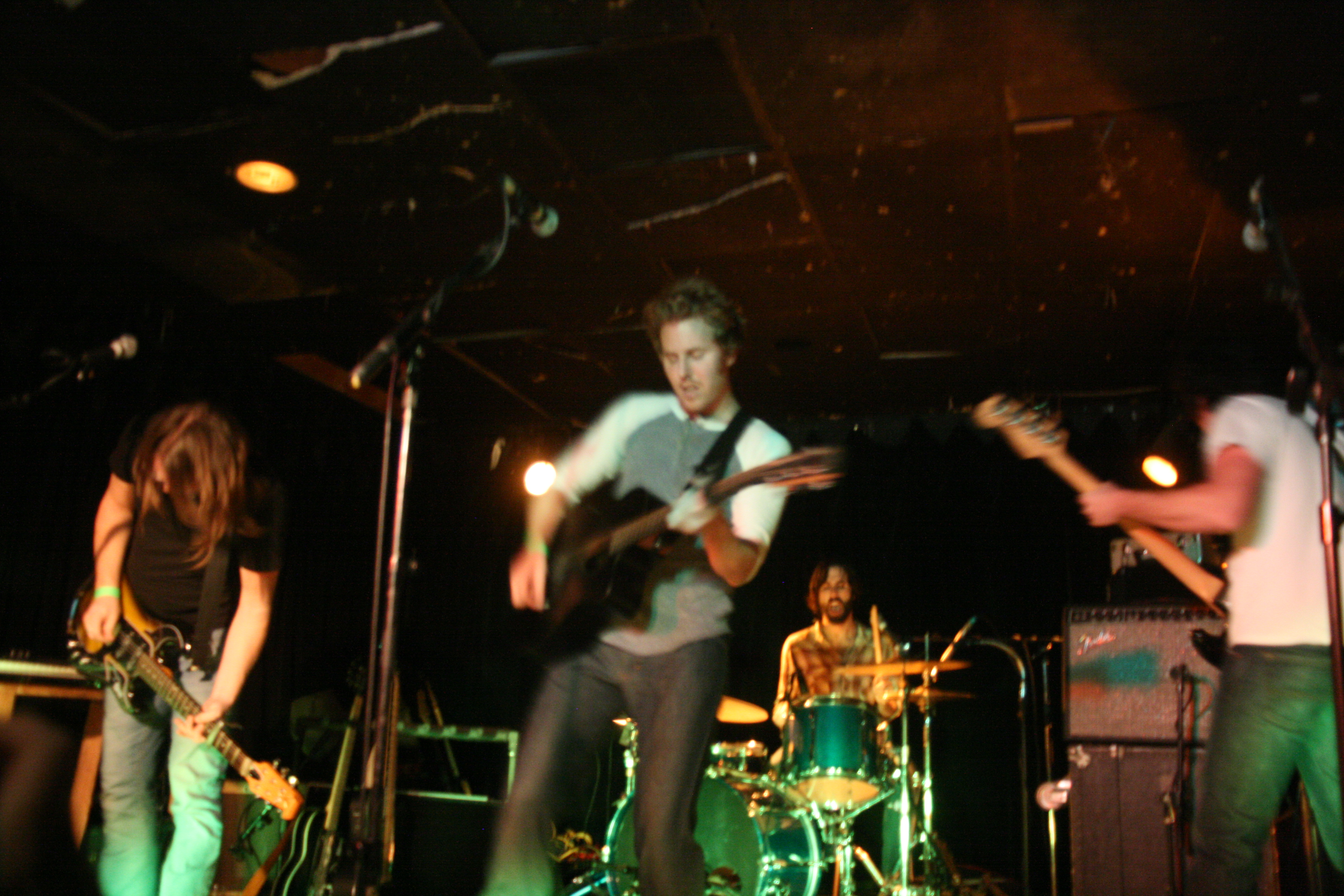 Ha Ha Tonka